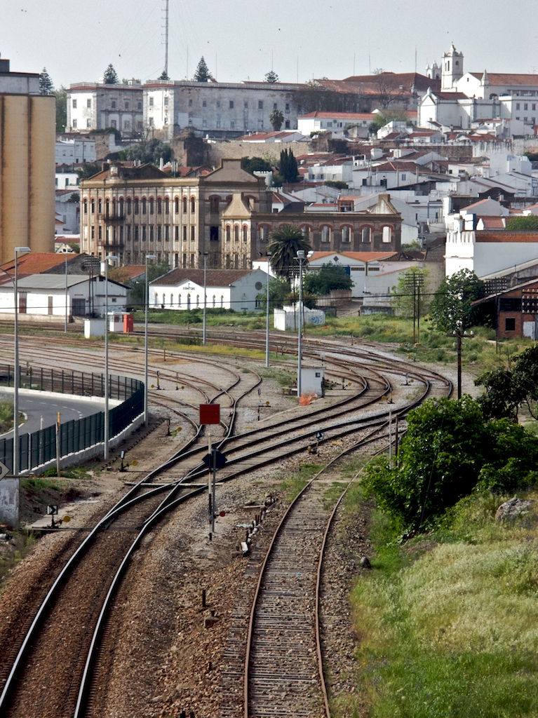 mais propriamente, a sua praia de vias. Tipo: EP (Estação) Local: Beja Linha do Alentejo, PK 153 Data e hora: 6 de Abril de 2008 09h20